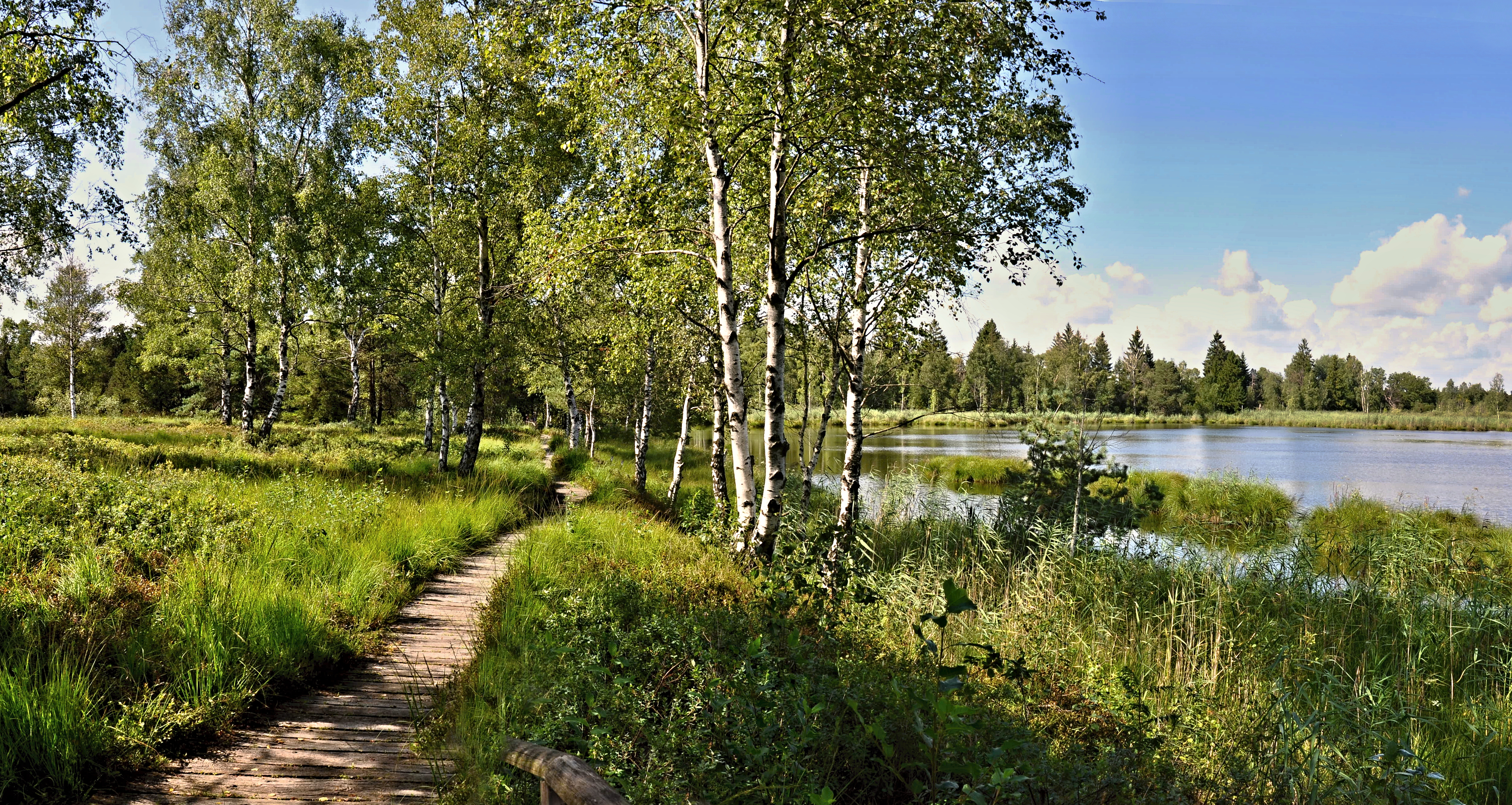 Hochsommer am Riedsee . Randbereiche sind mit dichtem Röhricht bewachsen und Übergänge zur Randbestockung mit Birke, Waldkiefer, Spirke und Fichte.